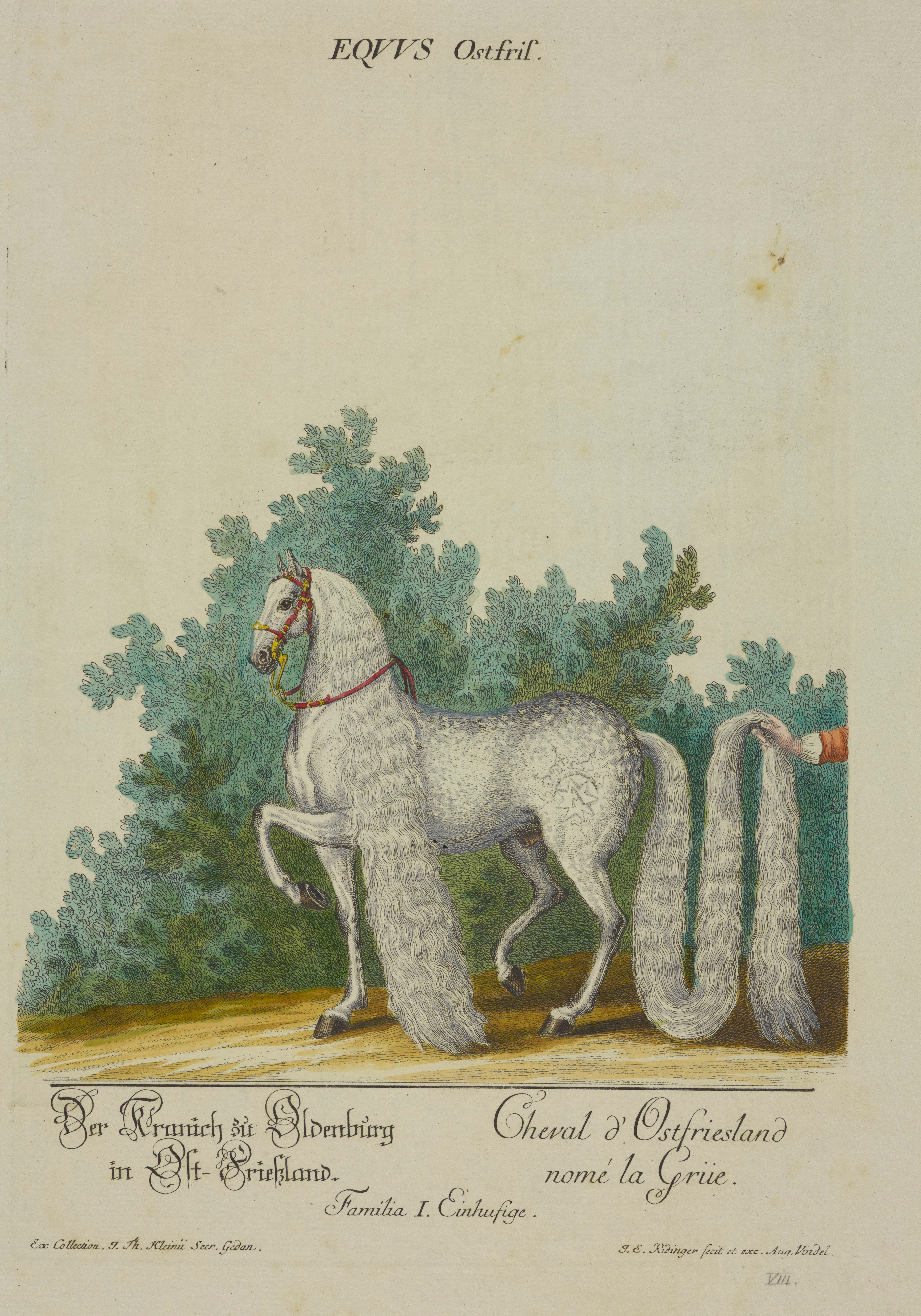 Equus Ostfris - Johann Elias RidingerAkwaforta/etching